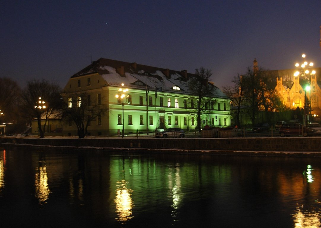 Budynek PZU w Bydgoszczy